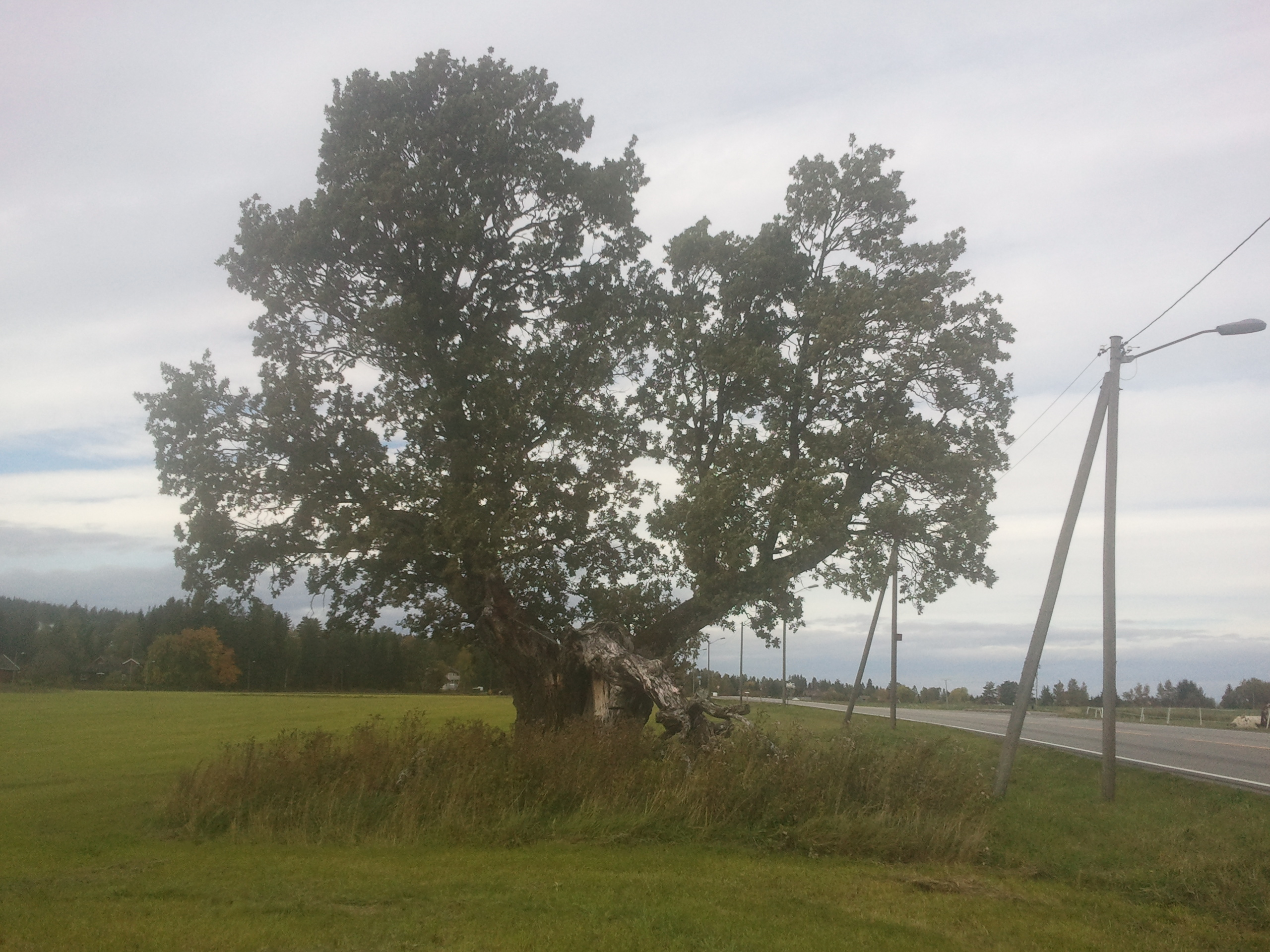 Den fredete eika ved fylkesvei 120 i Rælingen